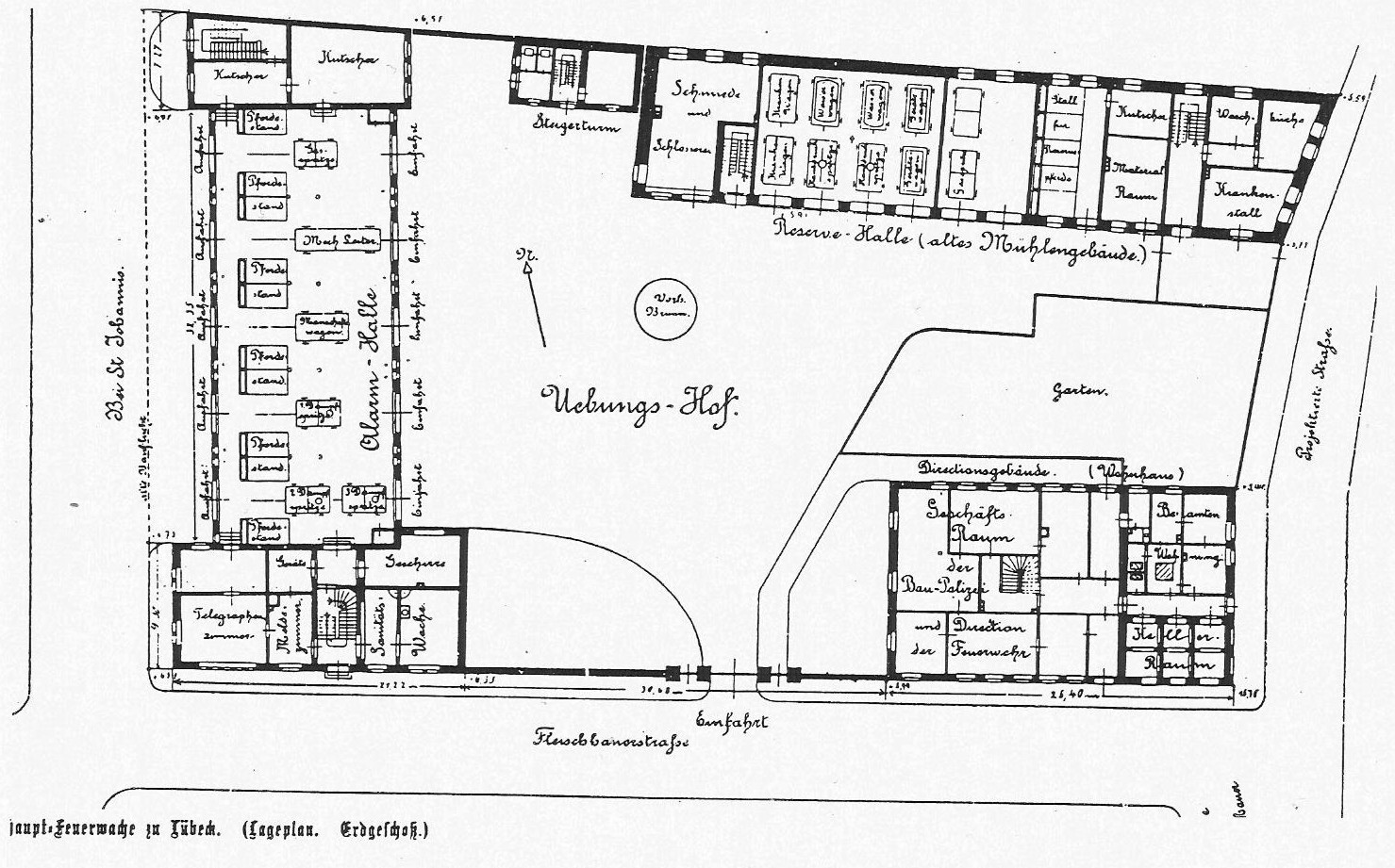 Haupt-Feuerwache zu Lübeck (Lageplan. Erdgeschoß).